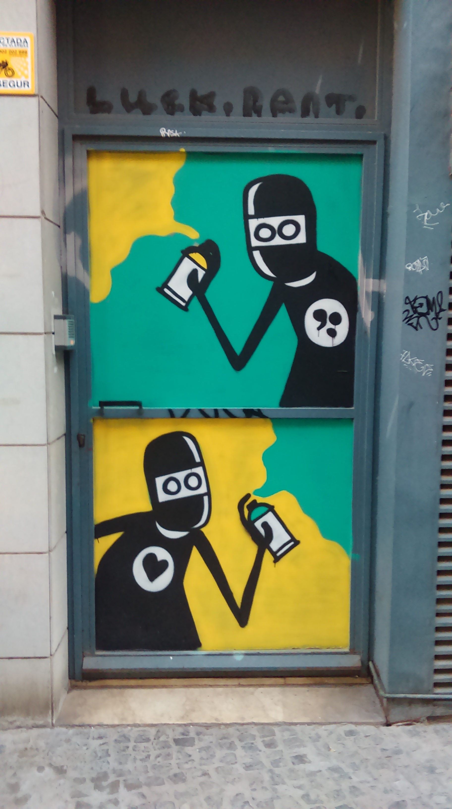 Personnage fétiche peint à la bombe aérosol par David de Limon